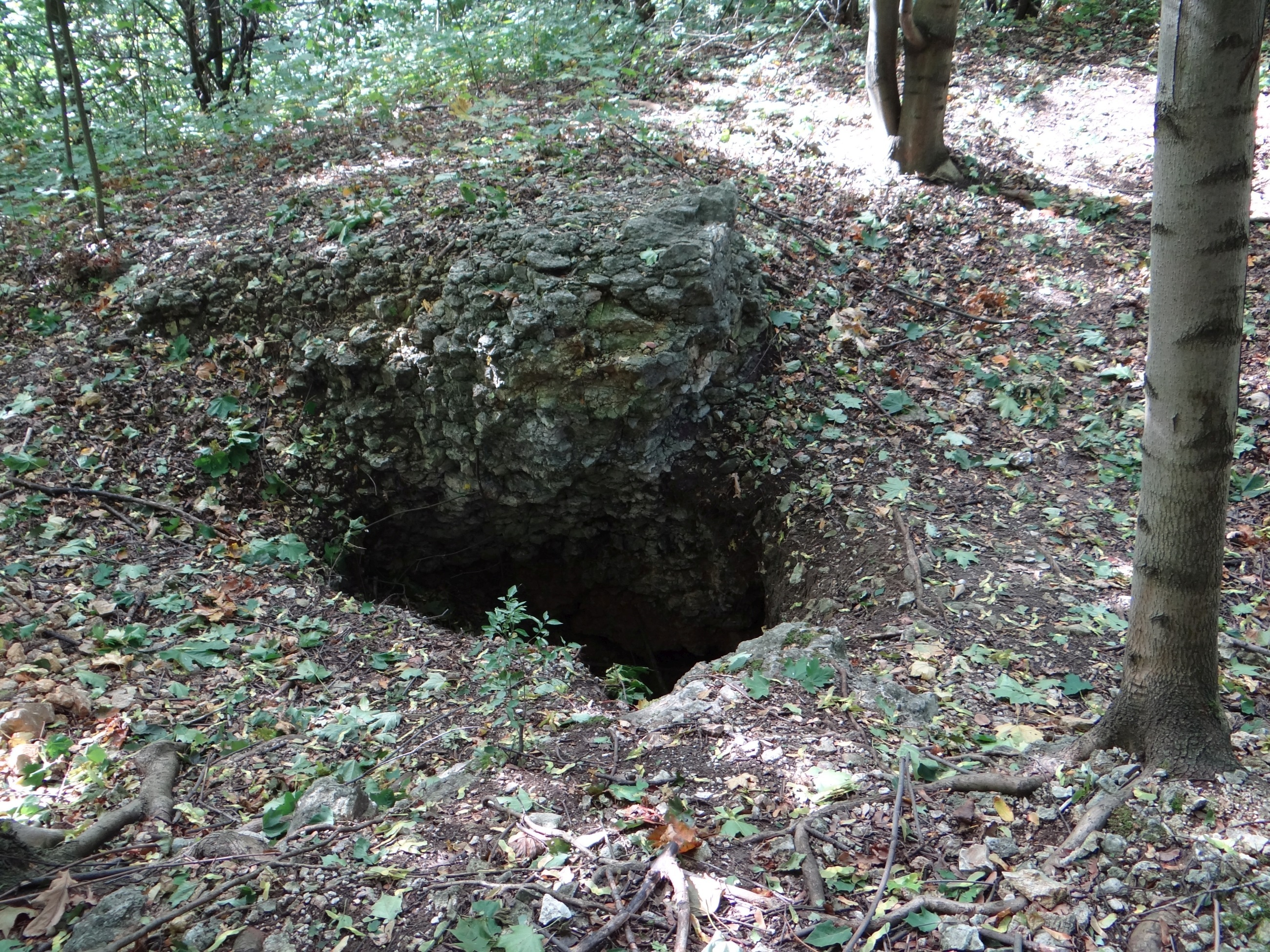 Jaskinia z Kulkami